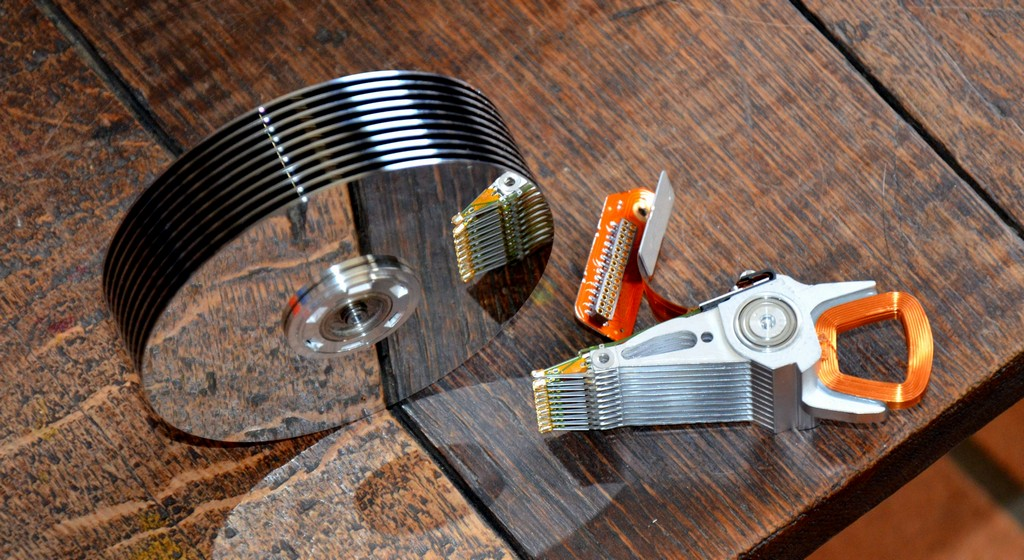 Disque SEAGATE de 36 GO ! On voit l'évolution technique dans le temps avec le nombre de plateaux et le peu de capacité, comparé à nos disques actuels.